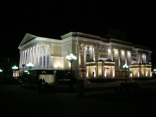 La Tjumena provinca teatro de dramo kaj komedio (Tjumeno, Rusio) Новое здание Тюменского драмтеатра